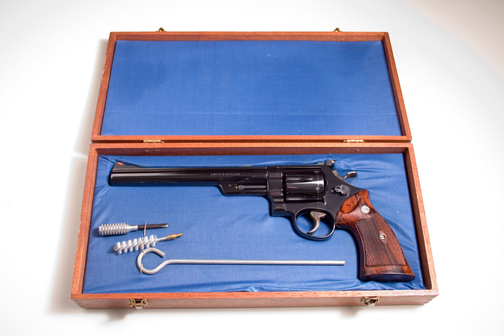 S&W Model 29 .44 Magnum